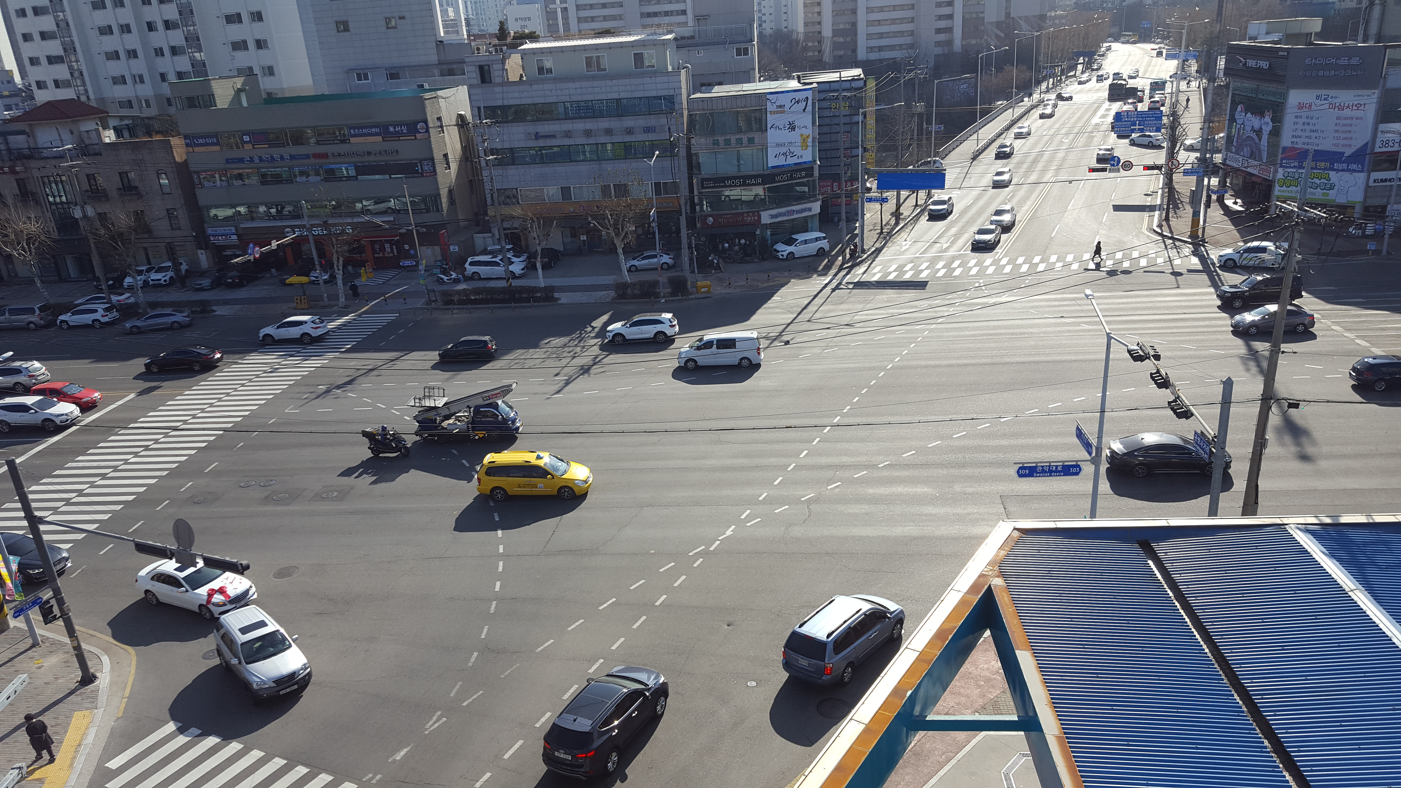 경기 안양시 동안구 관평로305번길 3에 위치한 무림메디빌딩에서 찍은 관양사거리